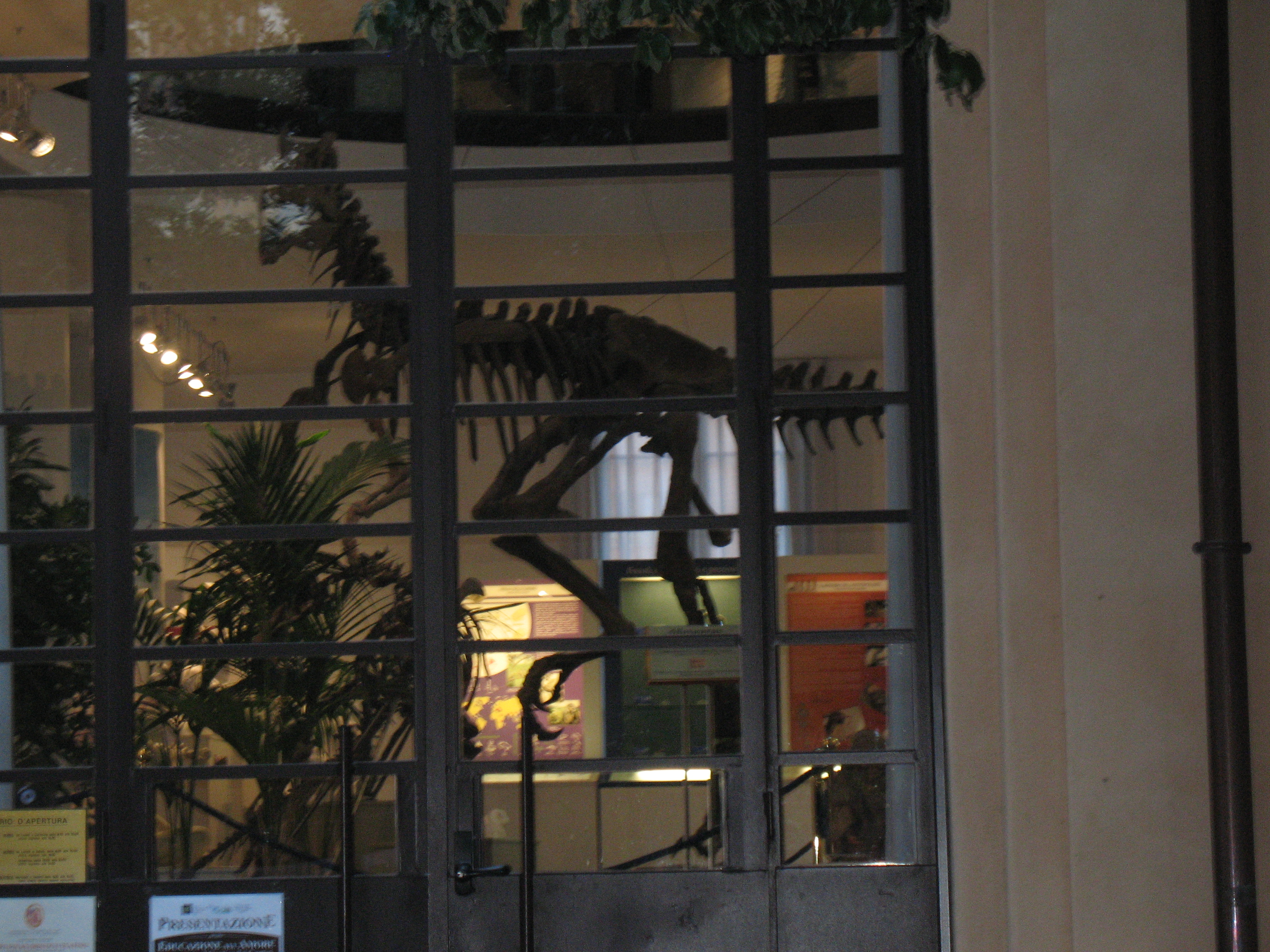 Cancello di entrata del Museo delle Scienze Biomediche che ha sede nel Palazzo dell'Opera Nazionale del Dopolavoro.